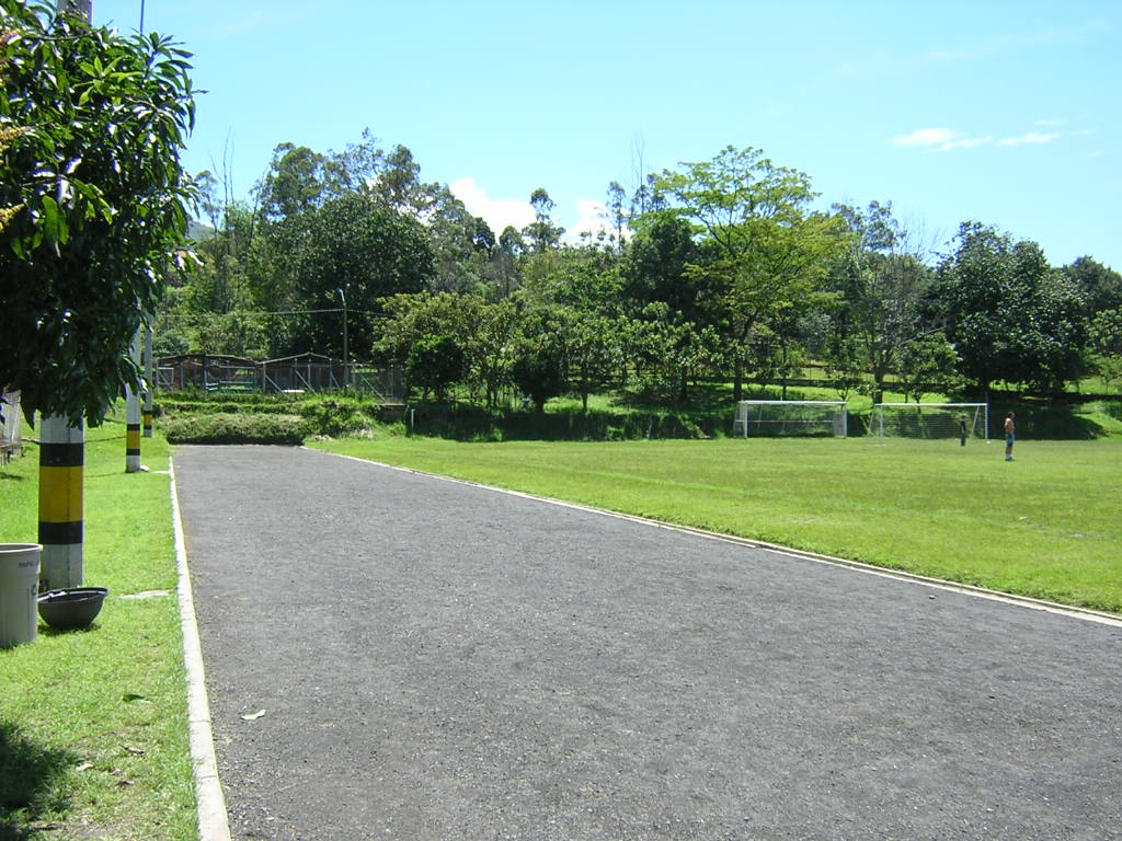 Cancha de Futbol y Pista, Ciudadela Robledo, Universidad de Antioquia, Medellín, Colombia (esta foto la tome yo, y la libero al dominio público)